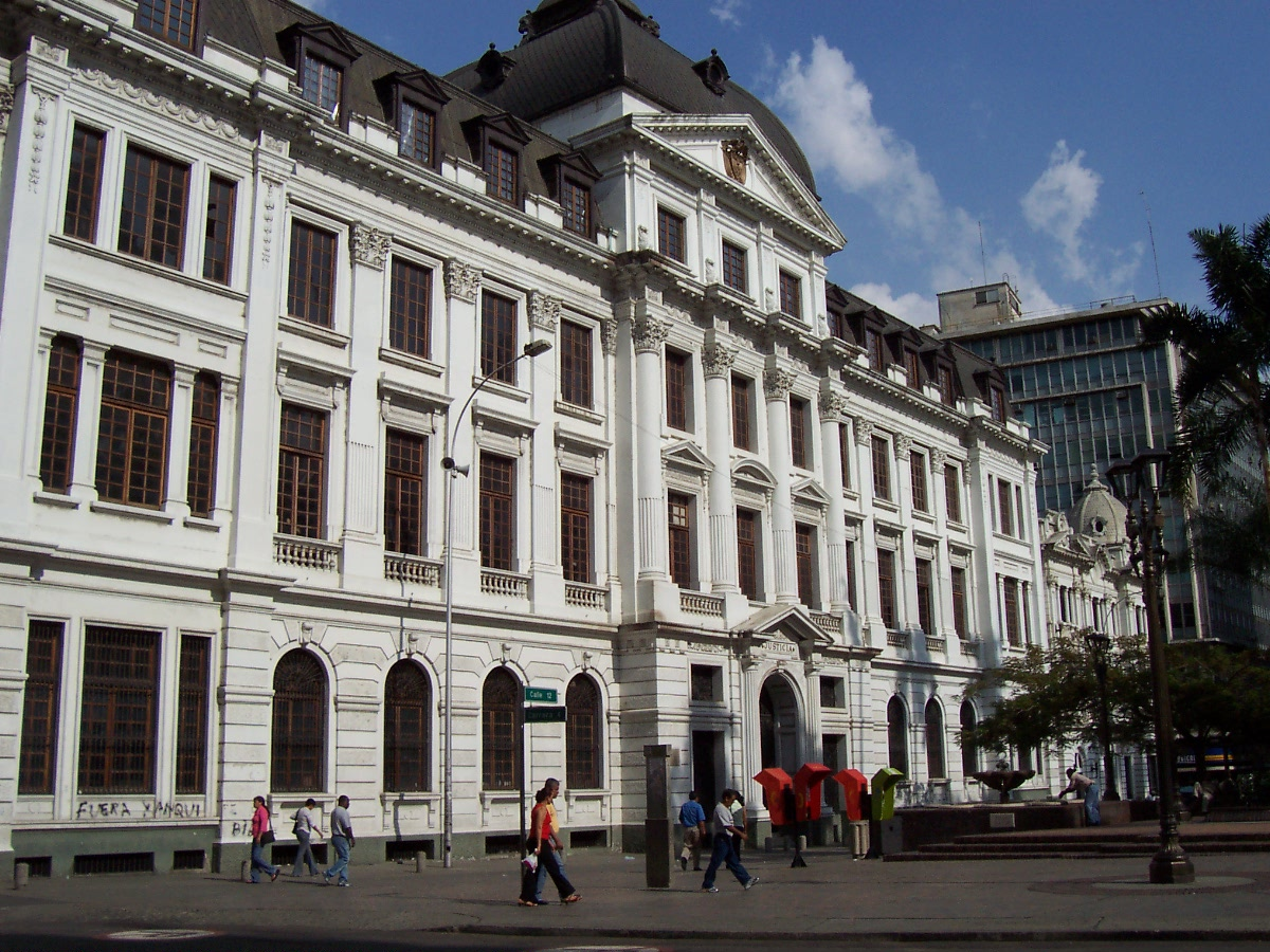 Antiguo Palacio de Justicia, Santiago de Cali, Colombia.